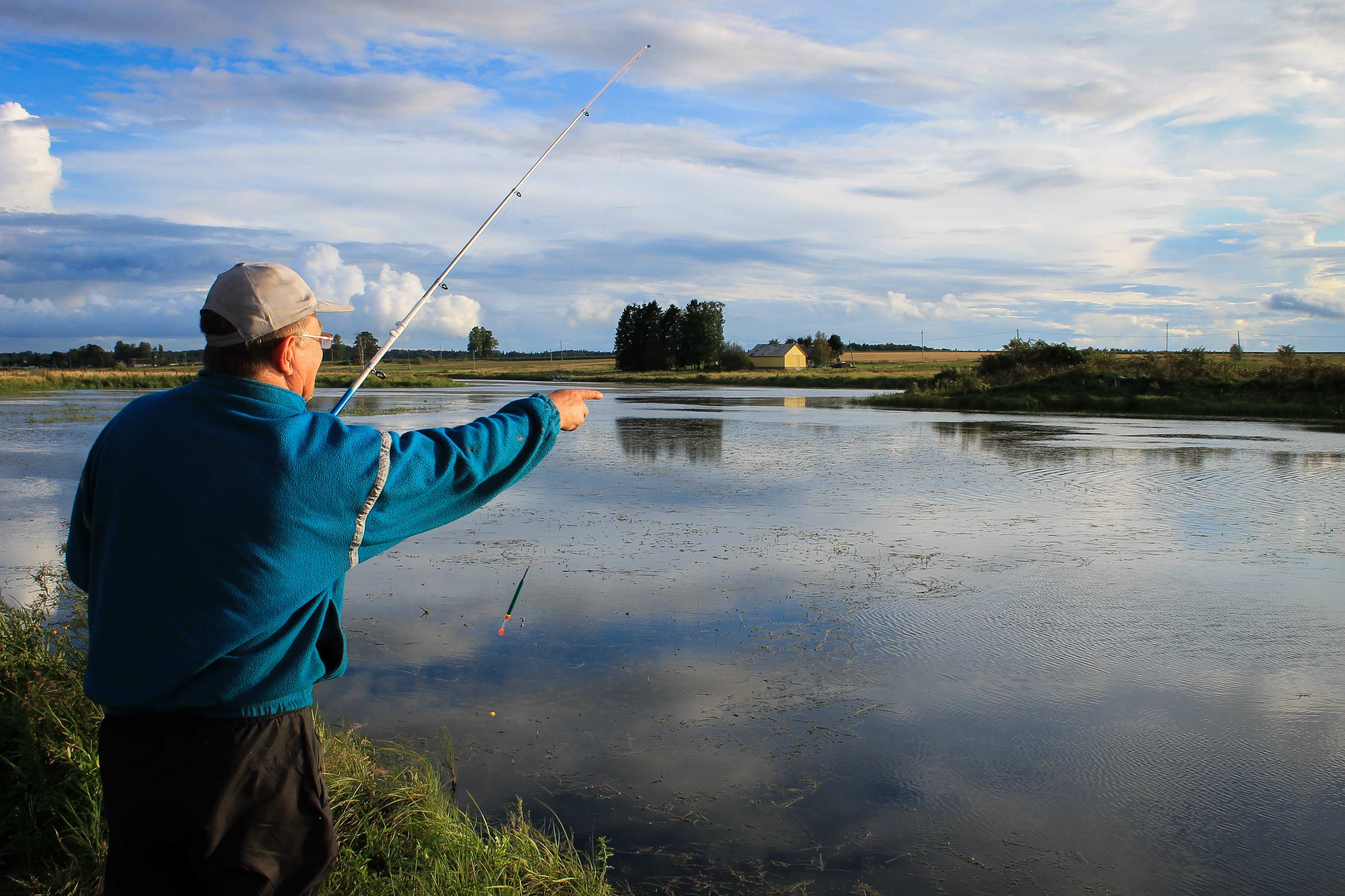 Kadrina paisjärv kuival suvel.